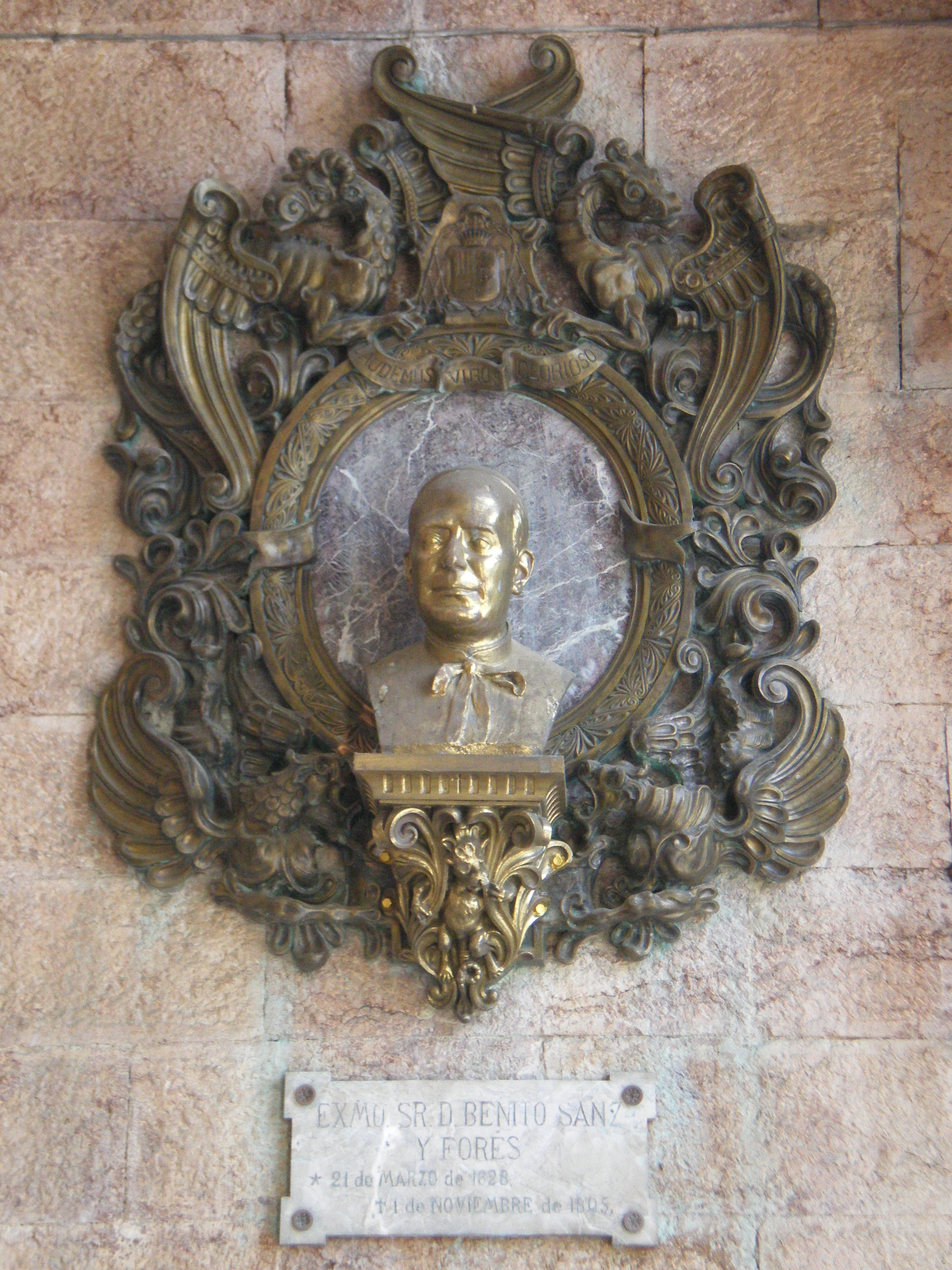 Busto de Benito Sanz y Forés en la entrada de la basílica de Covadonga